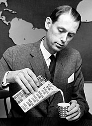 Hans Rausing satsade på den fyrkantiga mjölkförpackningen Tetra Brik (här på bild från 1963). Den blev till sist en enorm framgång för Tetra Pak, som idag är helt dominerande i världen på aseptiska mjölkförpackningar som inte behöver kylförvaras.